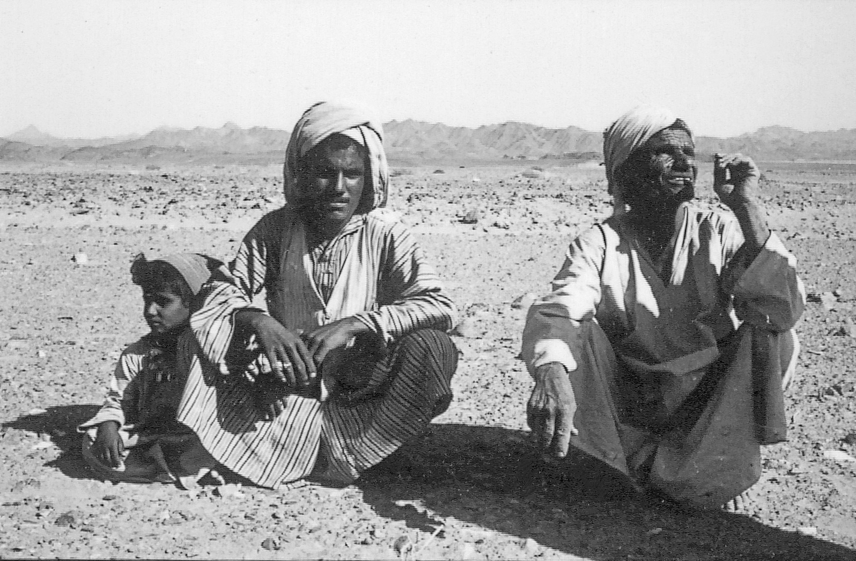 Ababda im Wadi Um Ghamis (1961)